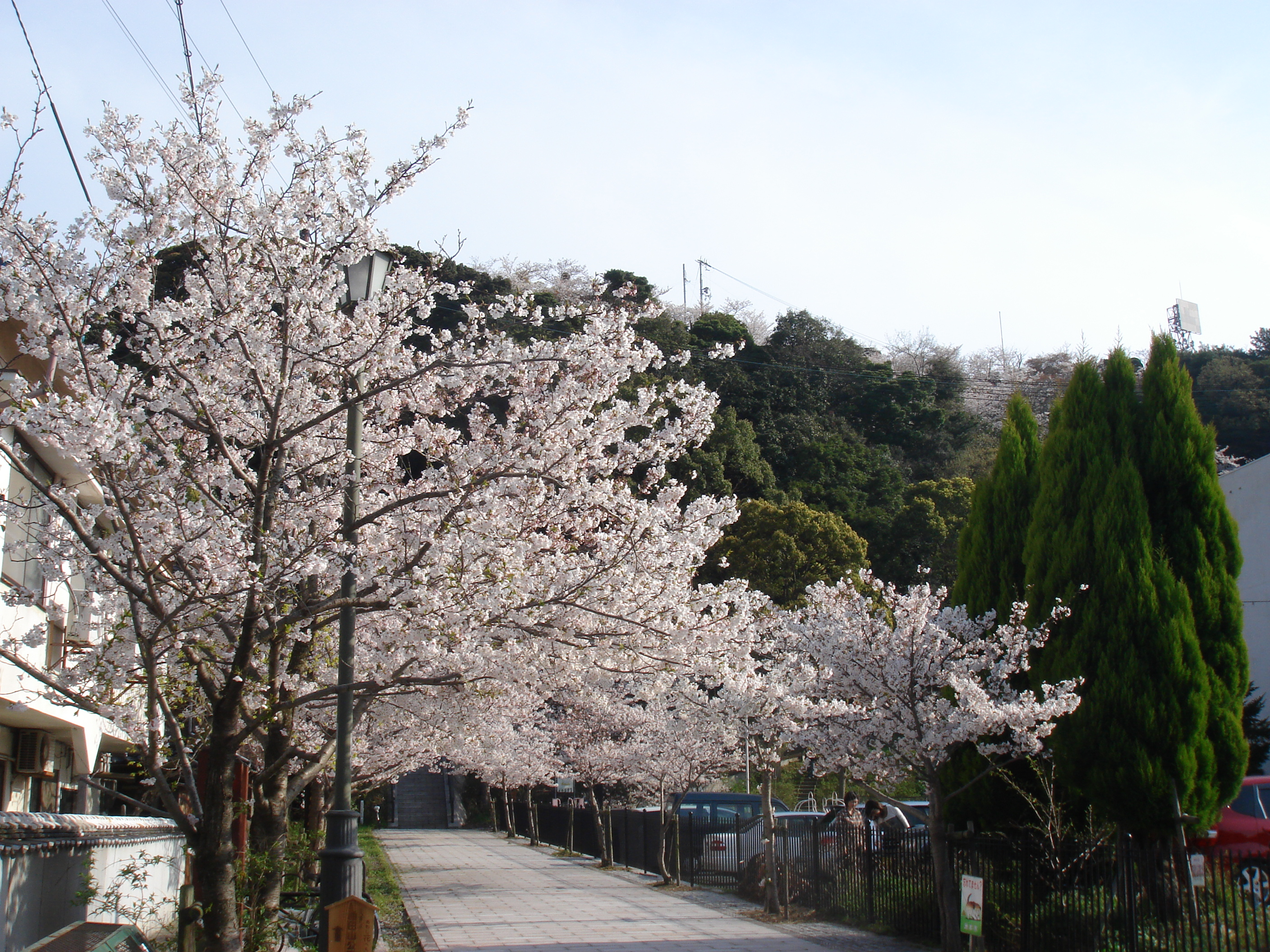 兵庫県洲本市・曲田山公園入口と満開に咲くソメイヨシノ